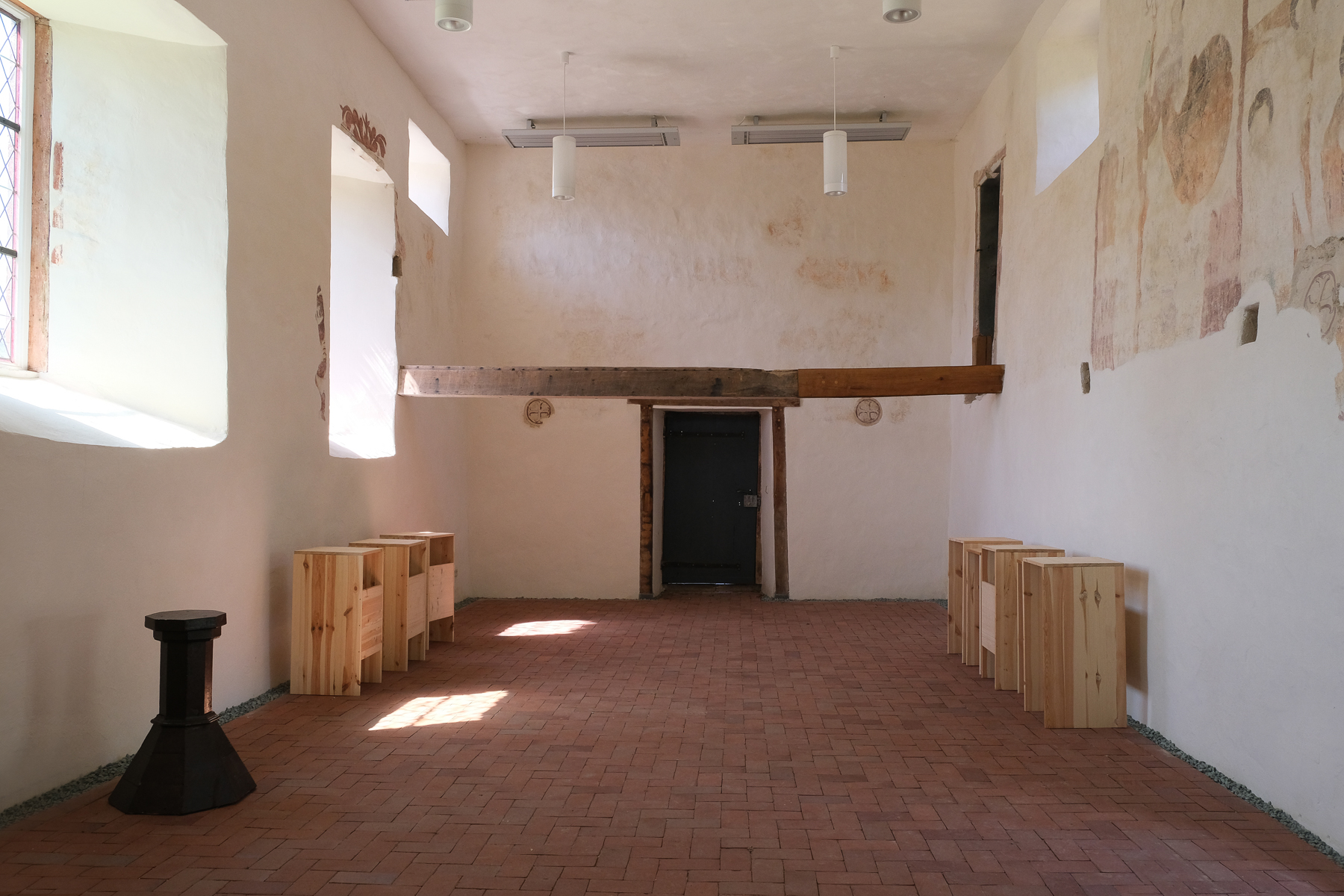 Alte Kirche Volpertshausen, Hüttenberg, Hessen, Deutschland